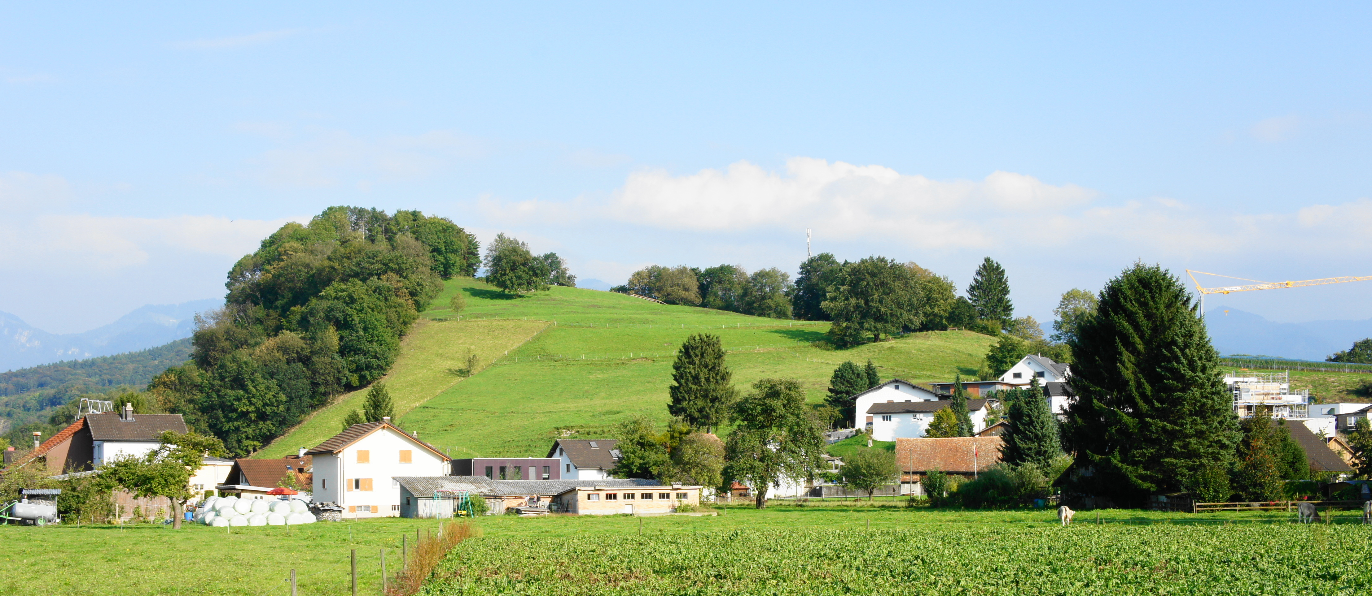 Montlingerberg, Blick auf die sanft ansteigende Westflanke, im Vordergrund der Ortsteil Hinterburg, Dorf Montlingen (rechts hinter dem Hügel), politische Gemeinde Oberriet SG